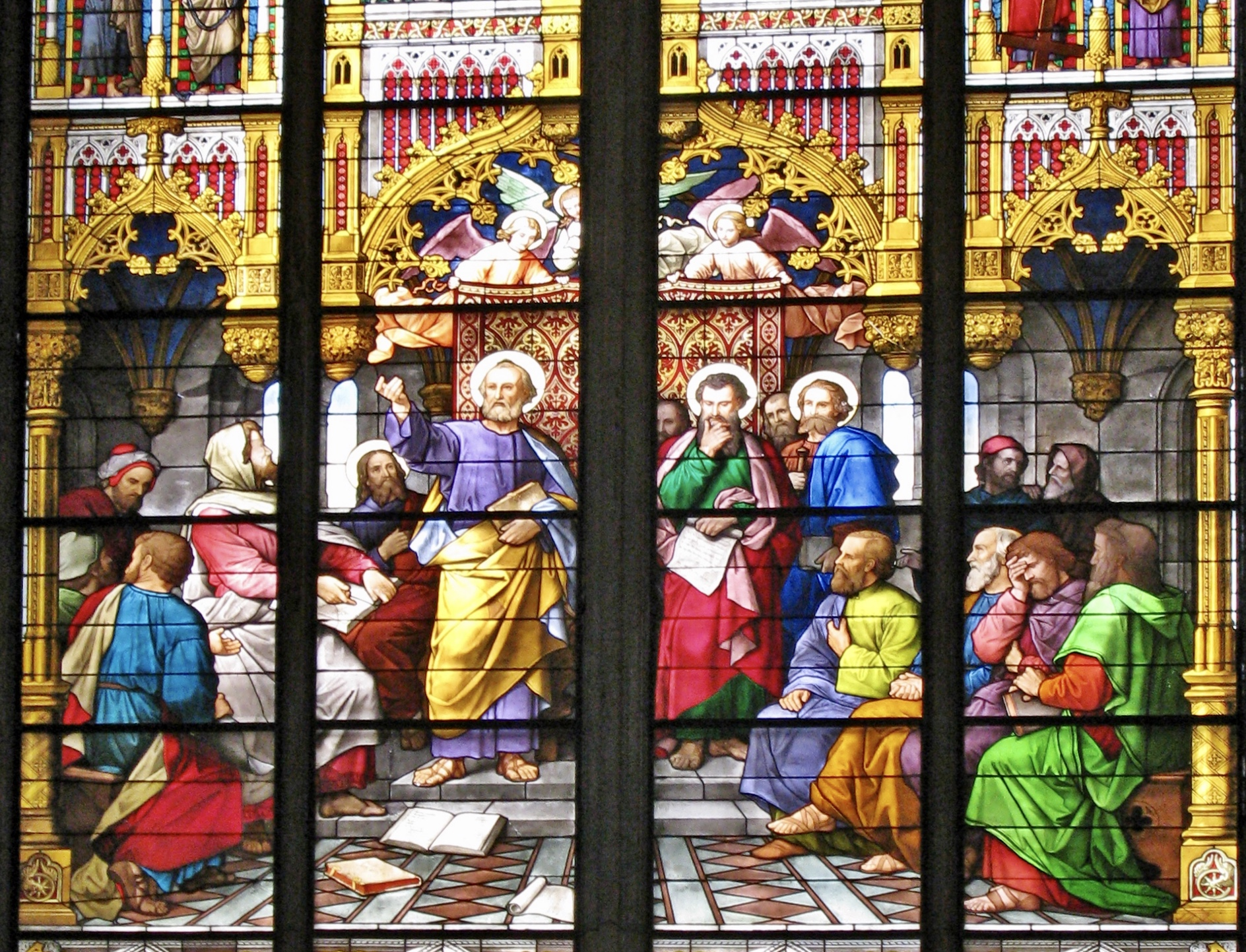 Kölner Dom: Apostelkonzil von Jerusalem. Hauptbild aus dem Petrusfenster im südlichen Querhaus von 1873. Hergestellt von der Königlichen Anstalt für Glasmalerei, München. Ausschnitt des Fotos File:Kölner Dom, Fenster des südlichen Querhauses, Westseite, Petrusfenster 1.JPG von WDWensky.